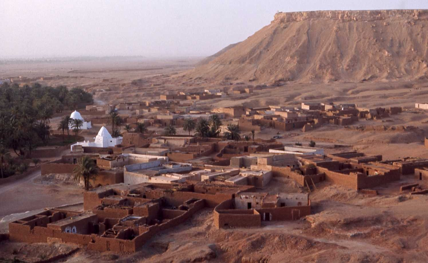 El-Goléa, Algérie